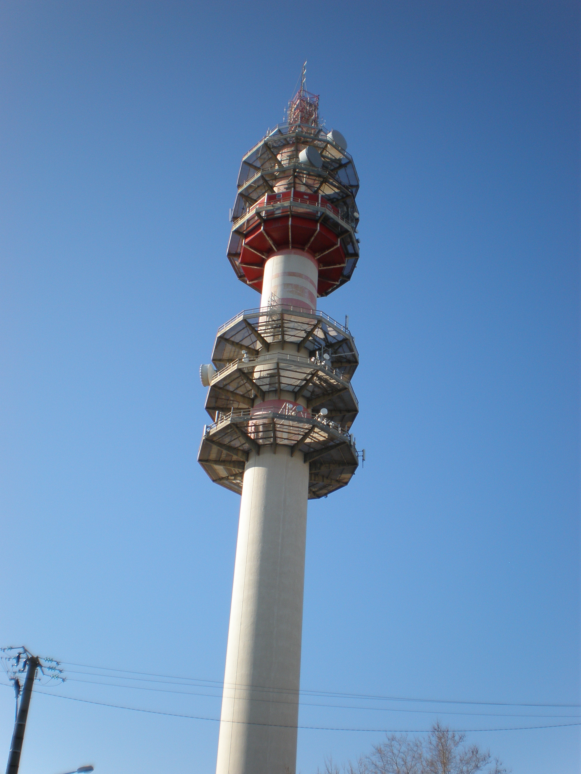 La tour-relai hertzien de Bionne à Montpellier, point culminant de la ville (hauteur 114 m)